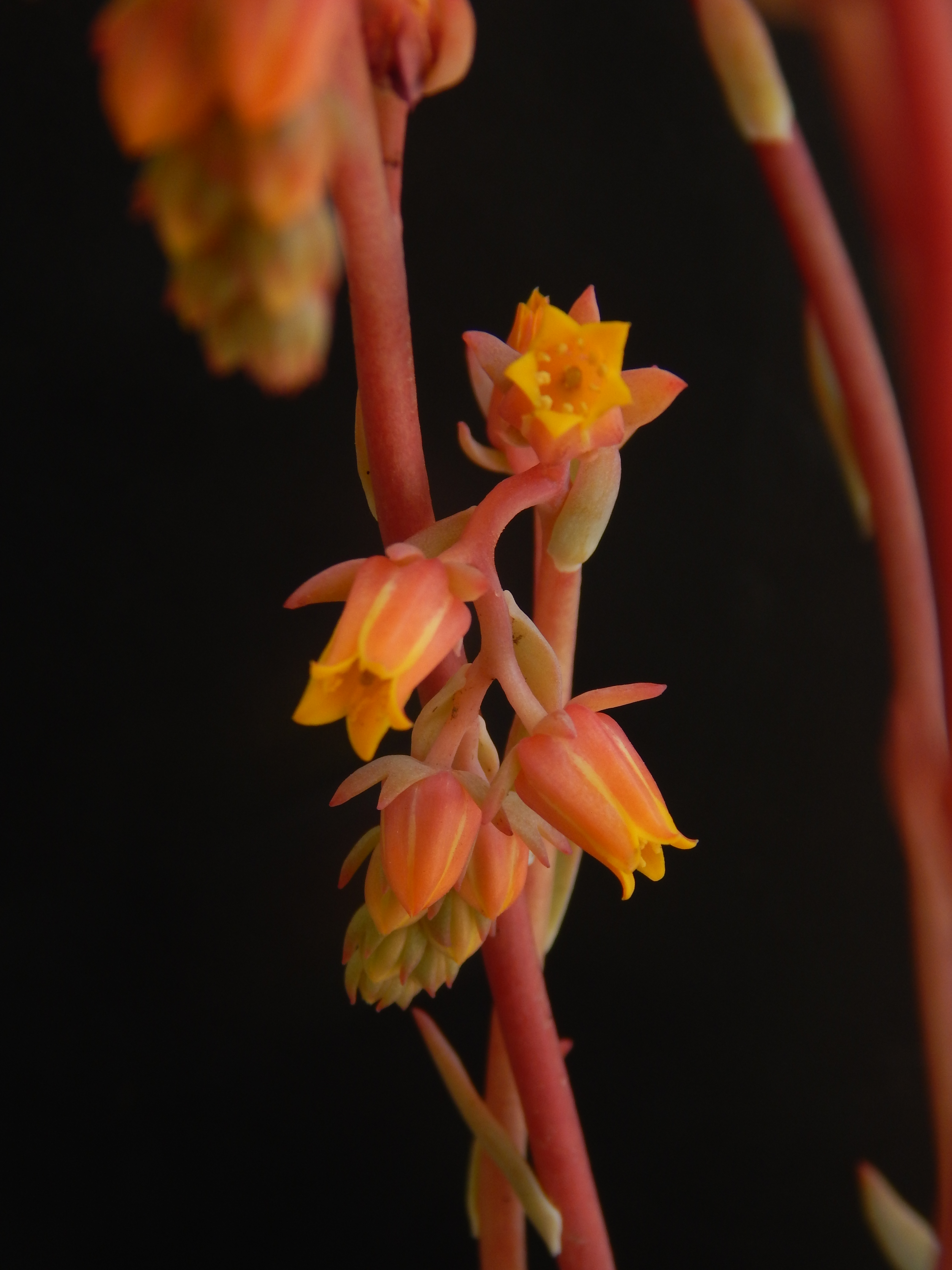 flores